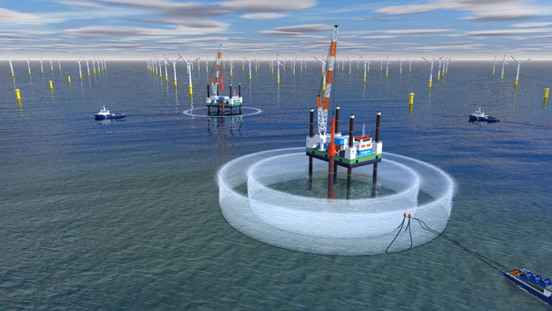 Big Bubble Curtain mit 2 Ringen. 3D-Illustration